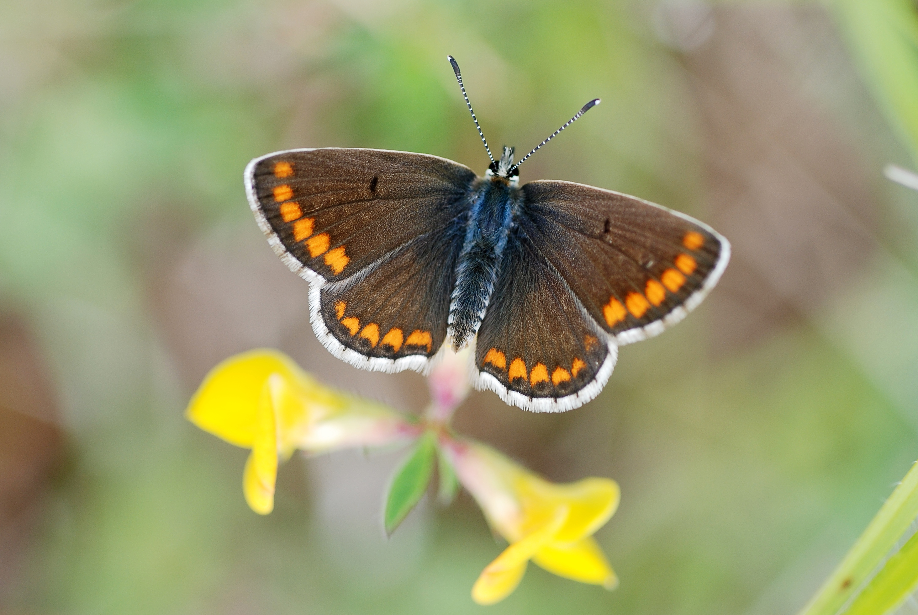 Kleiner Sonnenröschen-Bläuling (Aricia agestis)